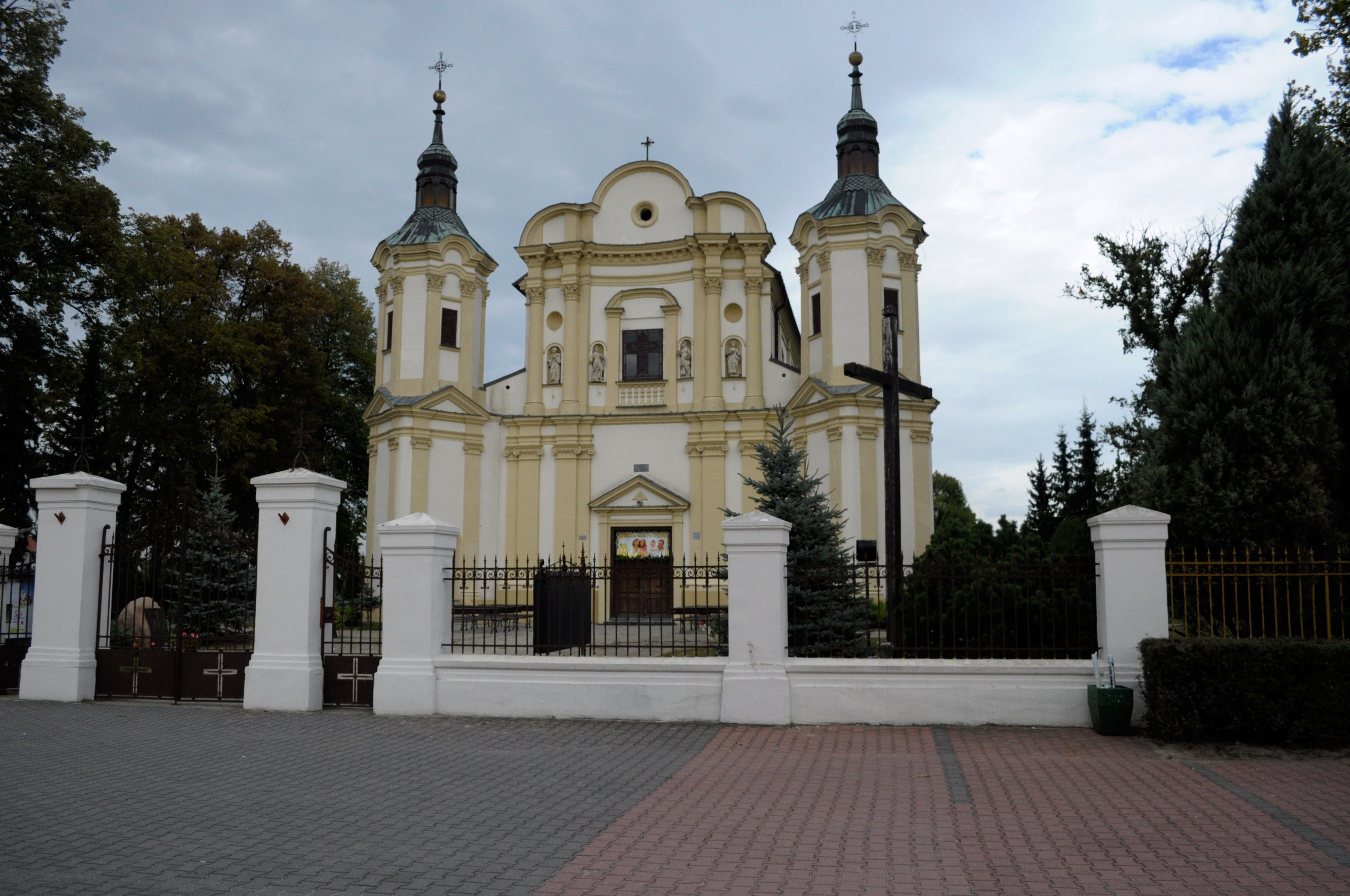 Kościół par. p.w. Świętego Ducha w Jasieńcu, powiat grójecki